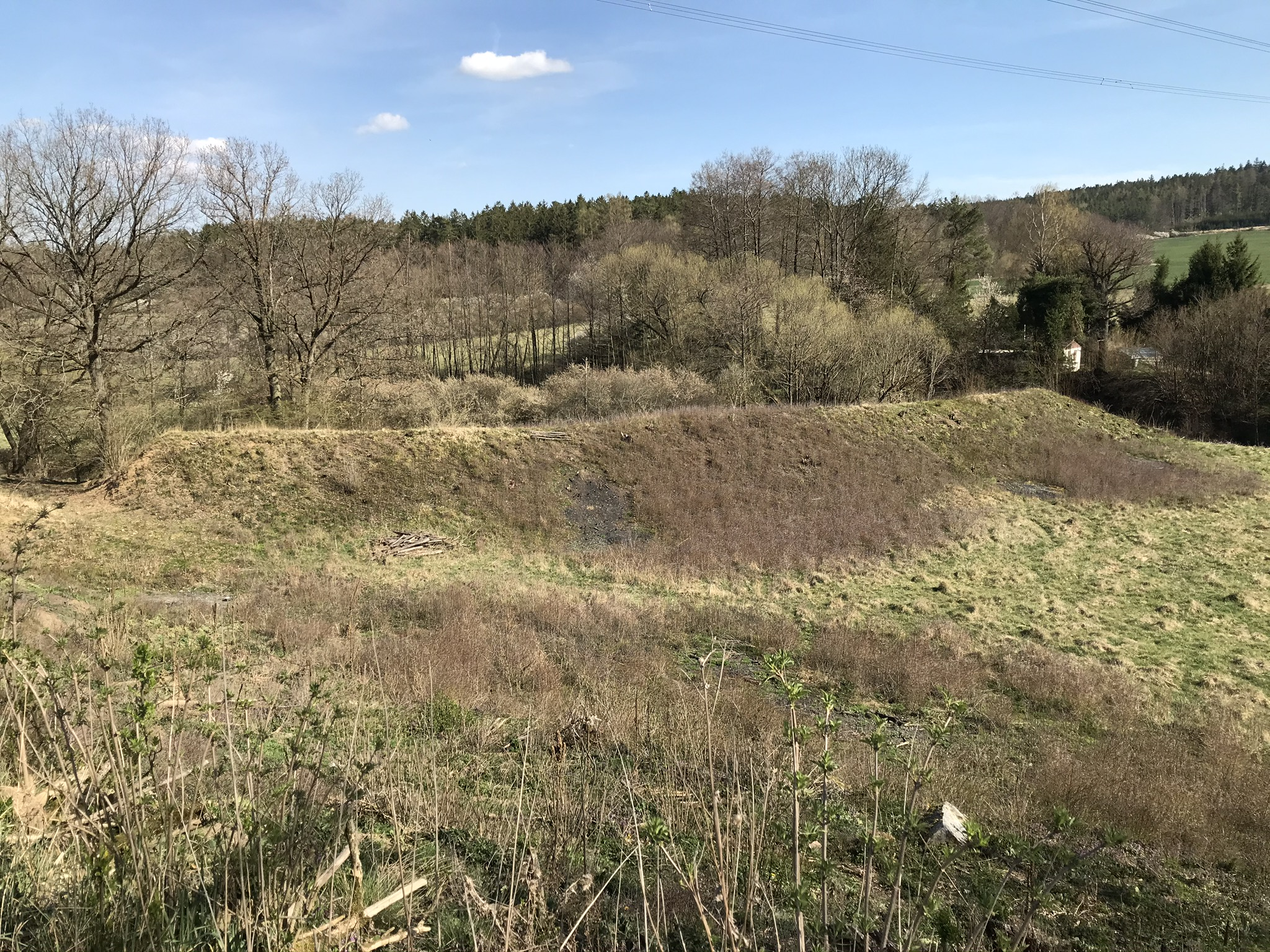 Protržený rybník v Hladoměři (také Hladomří) u Blovic (okres Plzeň-jih)